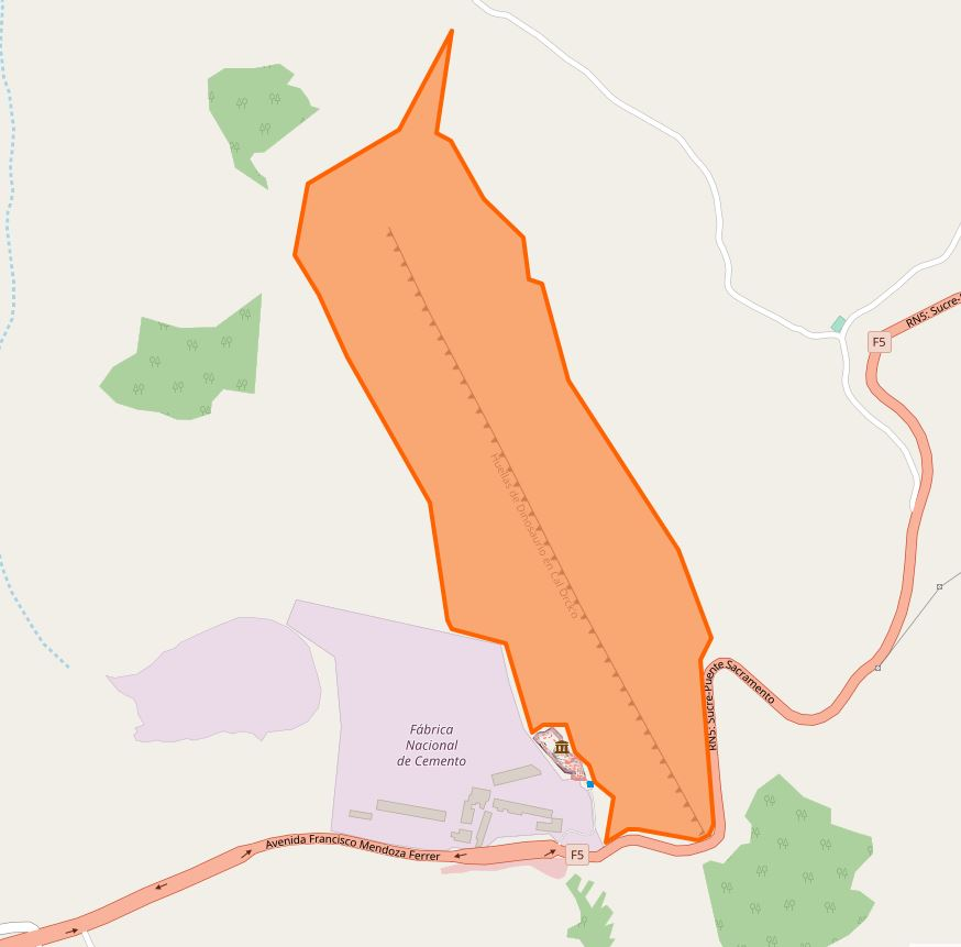 Mapa tomado de OpenStreetMap en 2019, con el área del yacimiento Cal Orcko resaltado en naranja.